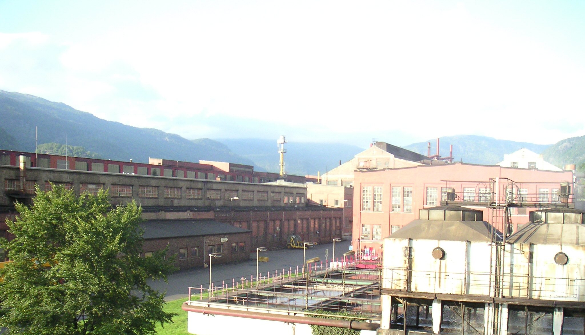 Bildet er tatt på området Sauda Næringspark Fotograf: Brukeren neitakk